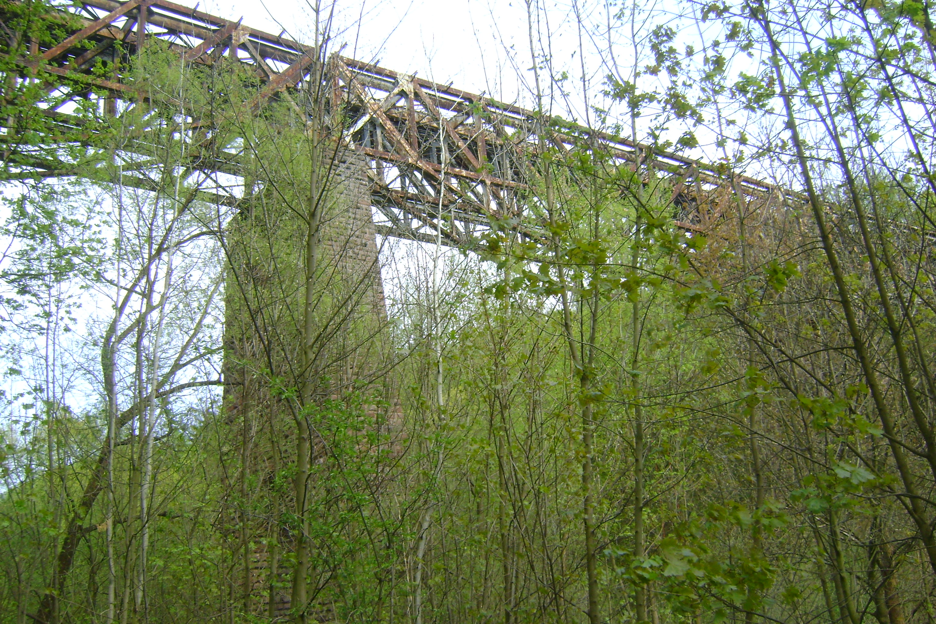 Wiadukt kolejowy w Zdrojowisku na trasie kolejowej Kłodzko-Wałbrzych.